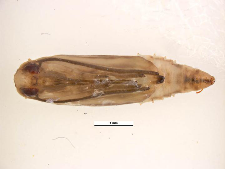 Plutella xylostella pupa, dorsal view